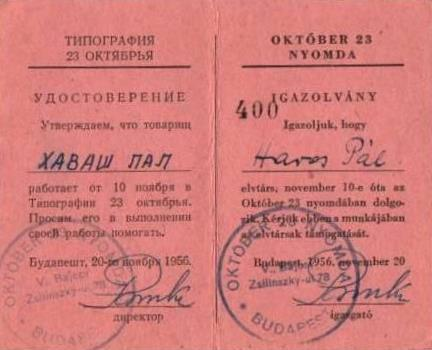 A Zrinyi Nyomda (1956. végén Október 23. Nyomda) igazolványa. - Budapest, II. Rákóczi Ferenc utca 177-179. - - GPS Coordinates:: 47.416842, 19.060244